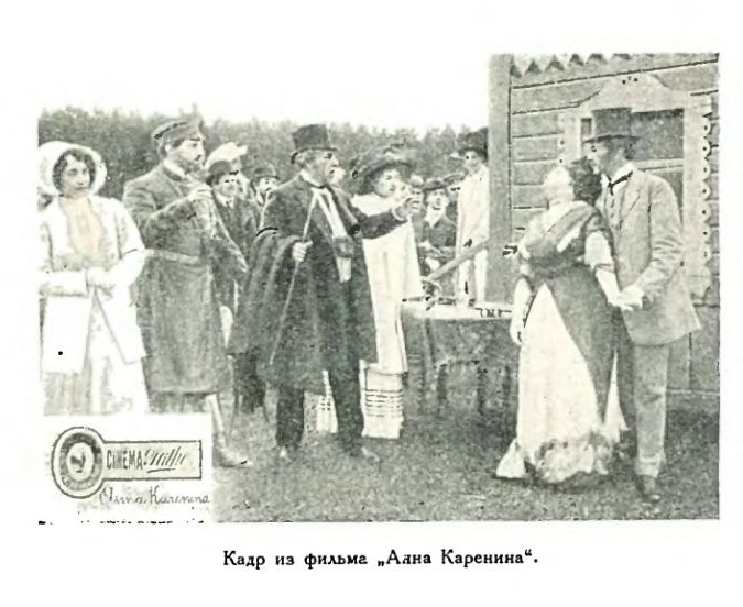 Сохранившийся кадр из утерянного фильма Анна Каренина 1911 года. Из книги Лихачева Б.С. "История кино в России (1896-1926) Материалы к истории русского кино. Часть 1 1896-1913." 1927 года выпуска